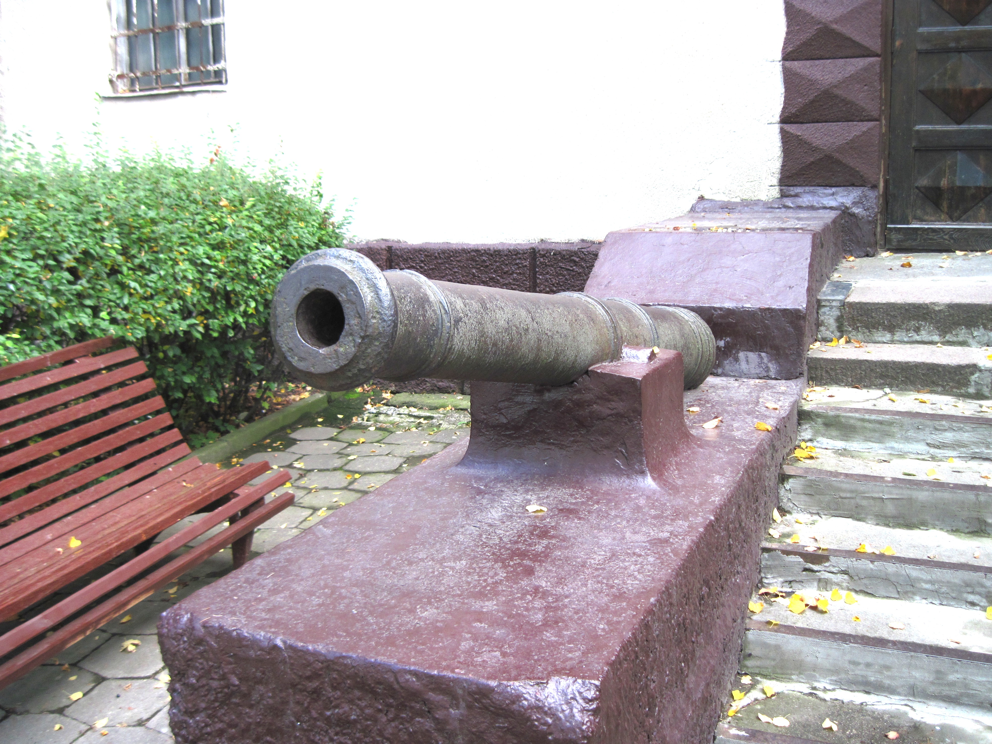 Гродна, Стары замак. Пушкі расійскай арміі, якія выцягнулі з Нёмана